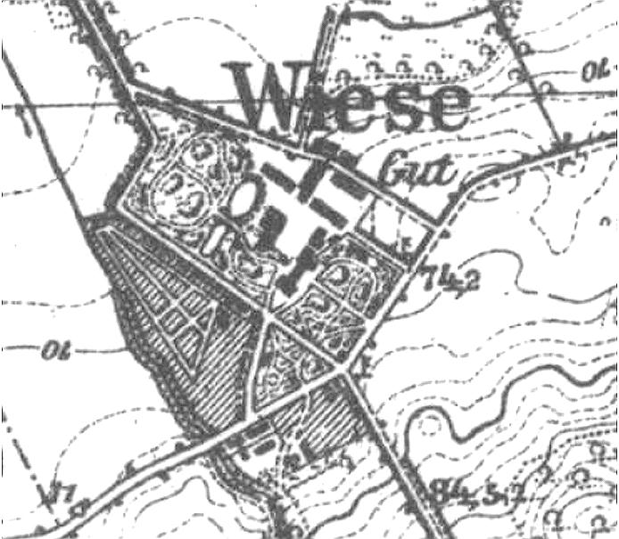 Kartenausschnitt Gut Wiese